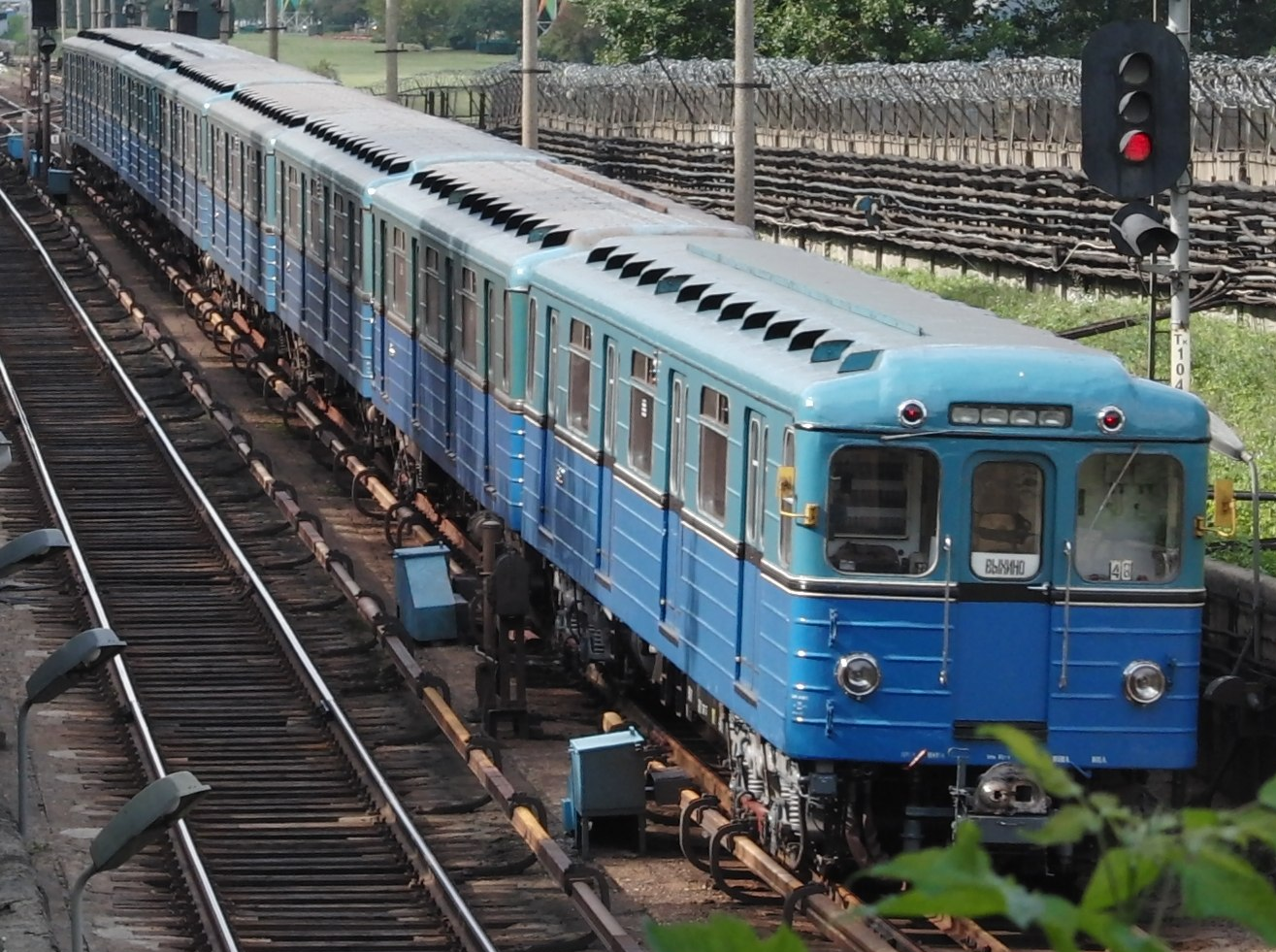 Volgograsky Prospekt - Tekstilshiky overground part of the line (Наземный перегон Волгоградский проспект-Текстильщики)